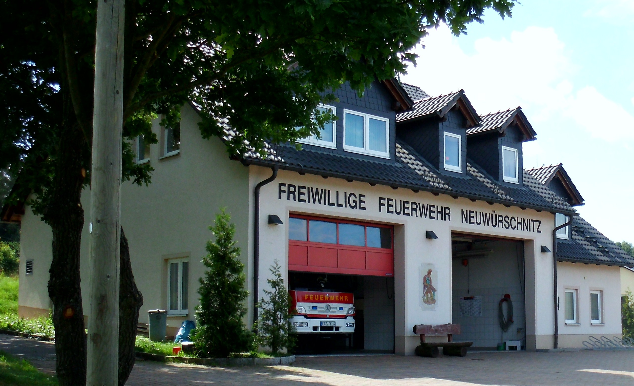 Hauptgebäude der Freiwilligen Feuerwehr Neuwürschnitz